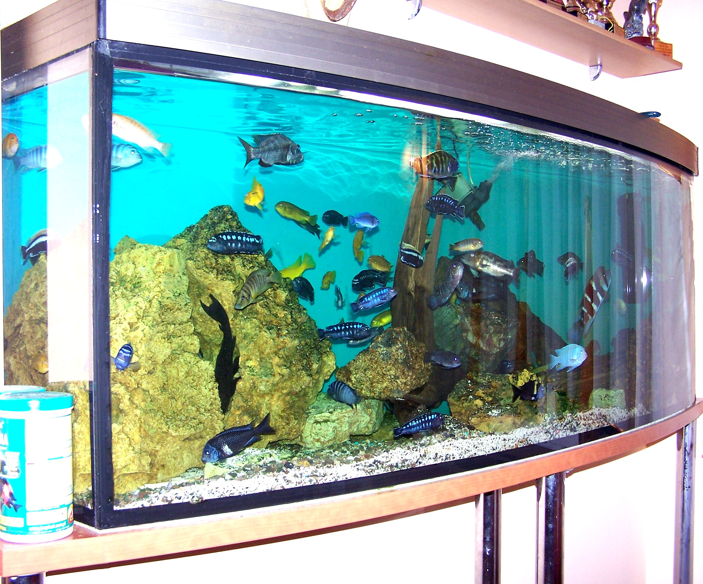 Akwarium z pielęgnicamiw Rybaczówce w Giszowcu